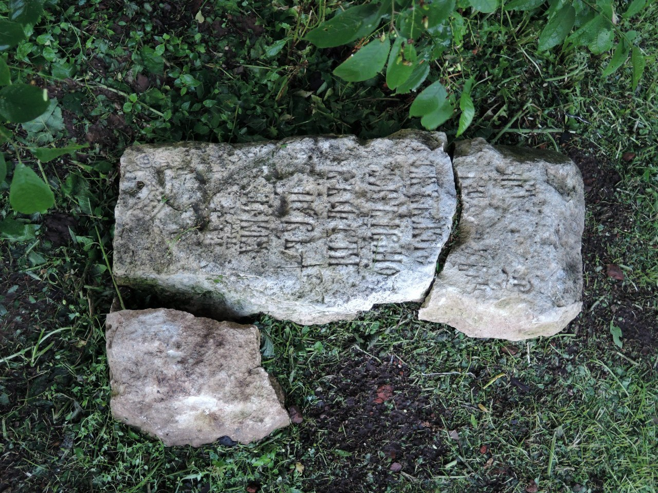 предположительно, боярина И. Ртищева